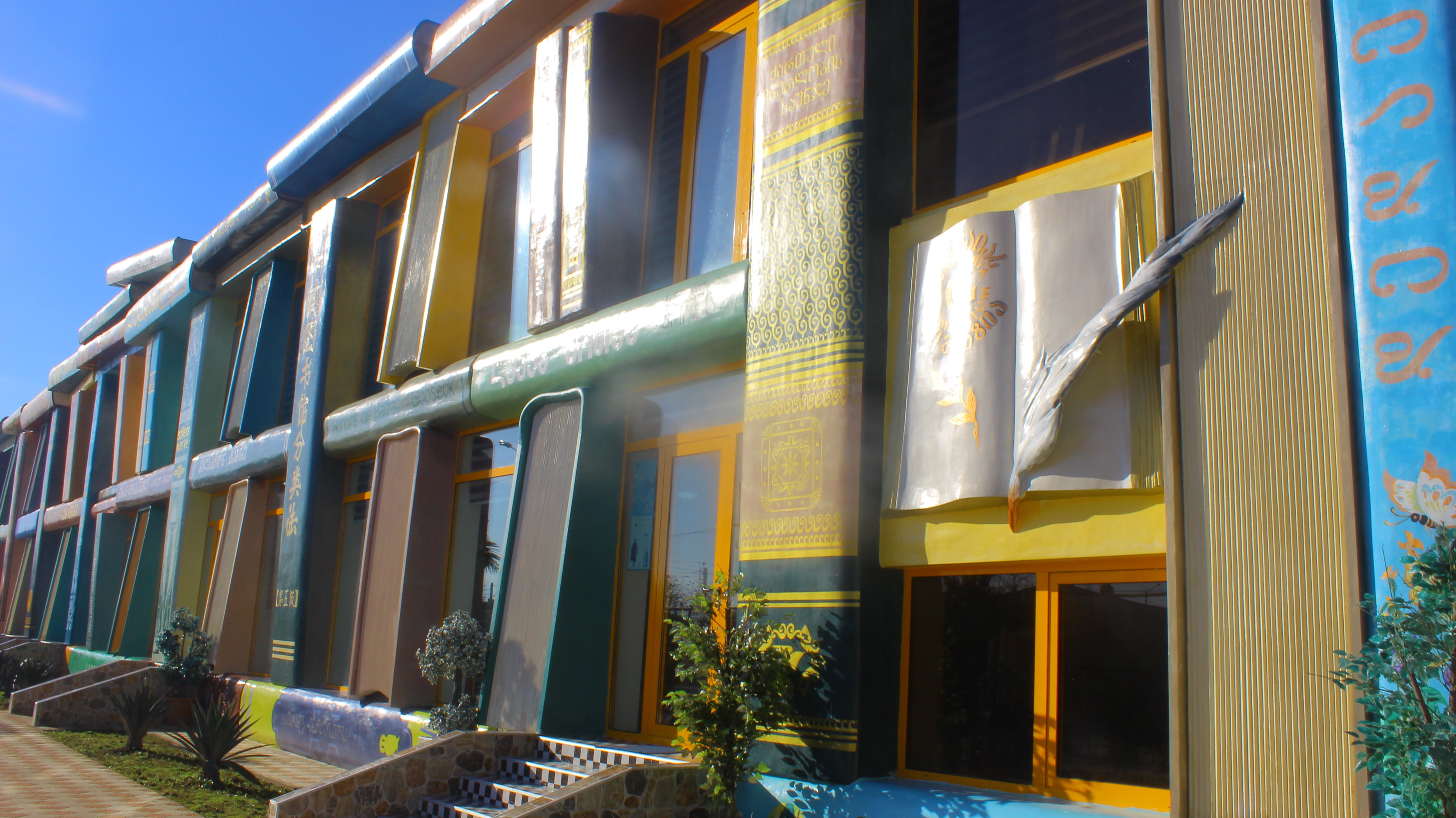 GG - is educational space, located in Zugdidi. Unique design and educational methods. (Location: 32 Tsaishvili Str., Zugdidi, Georgia), 2100